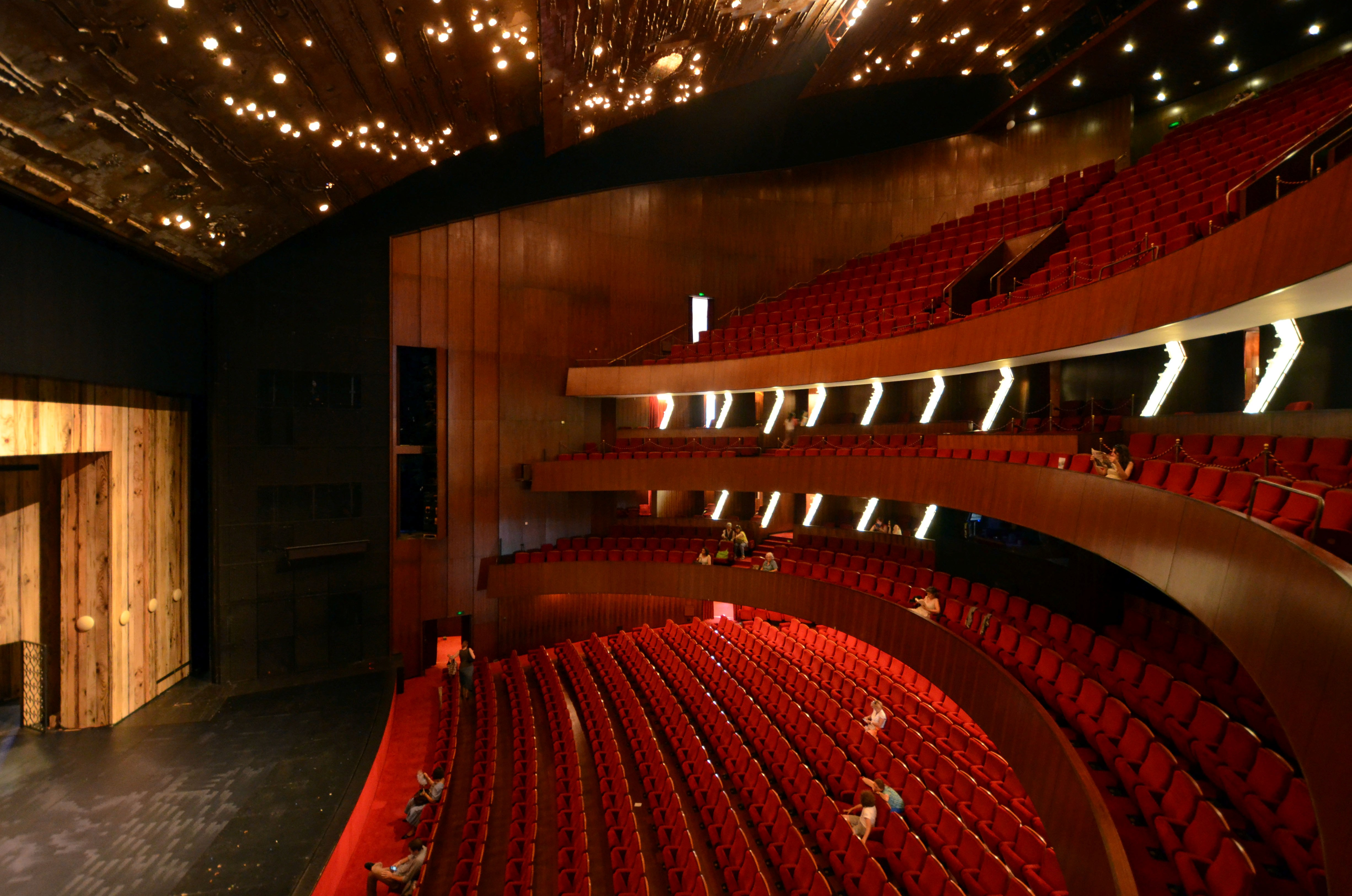 Auditorio del Gran Teatro de Ginebra